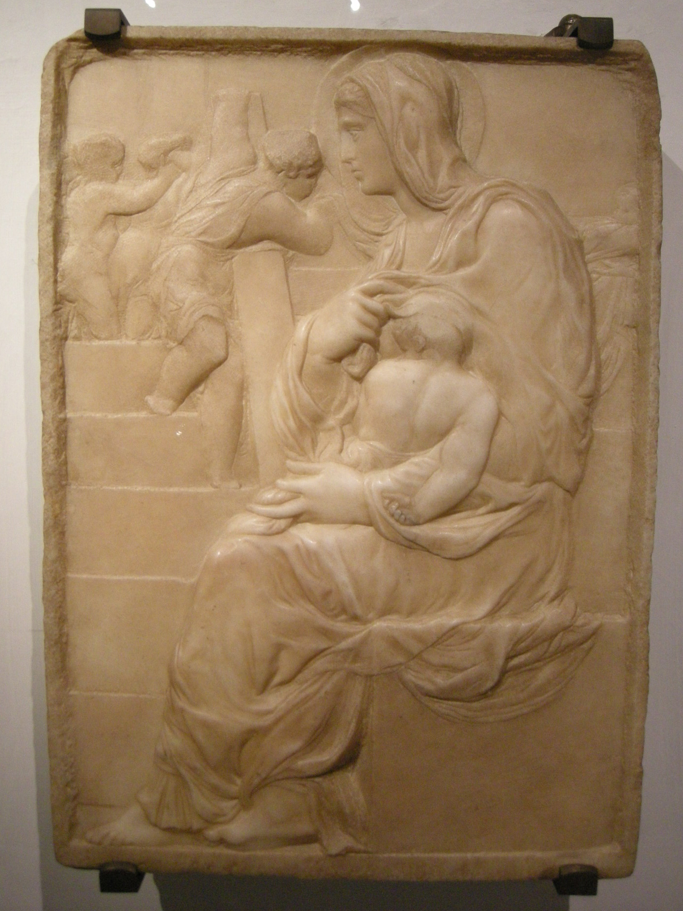 Michelangelo, madonna della scala, 1490 ca.